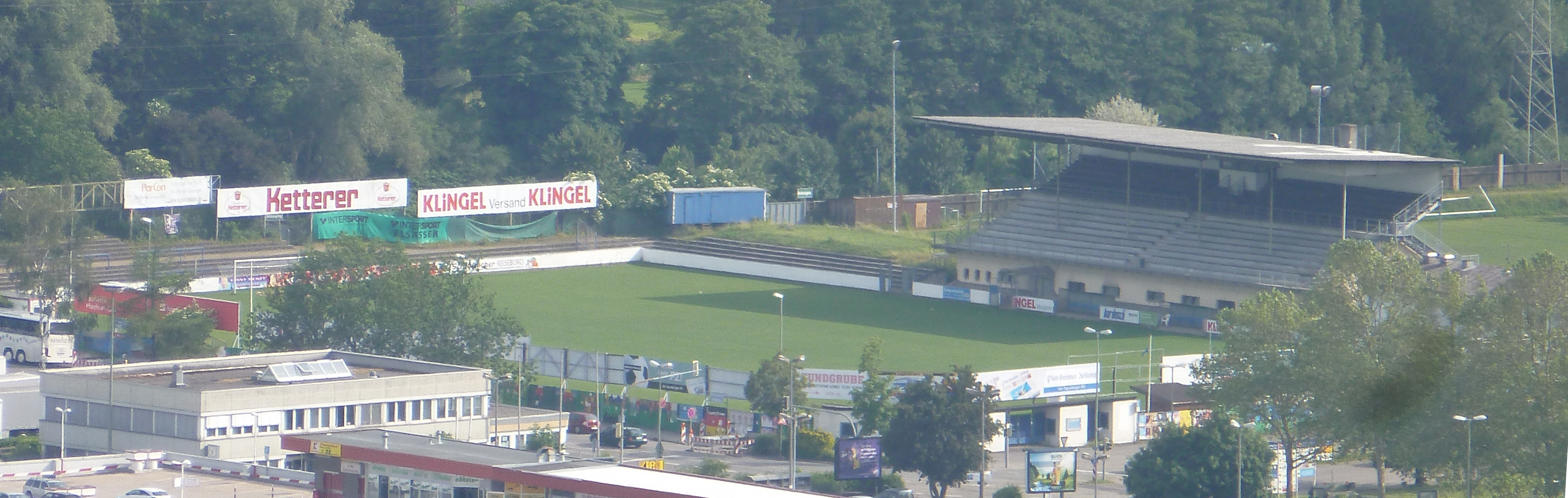 Stade du Brötzinger Tal à Pforzheim, vu depuis Wallberg